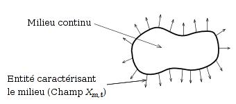 Milieu continu (Schéma de principe)